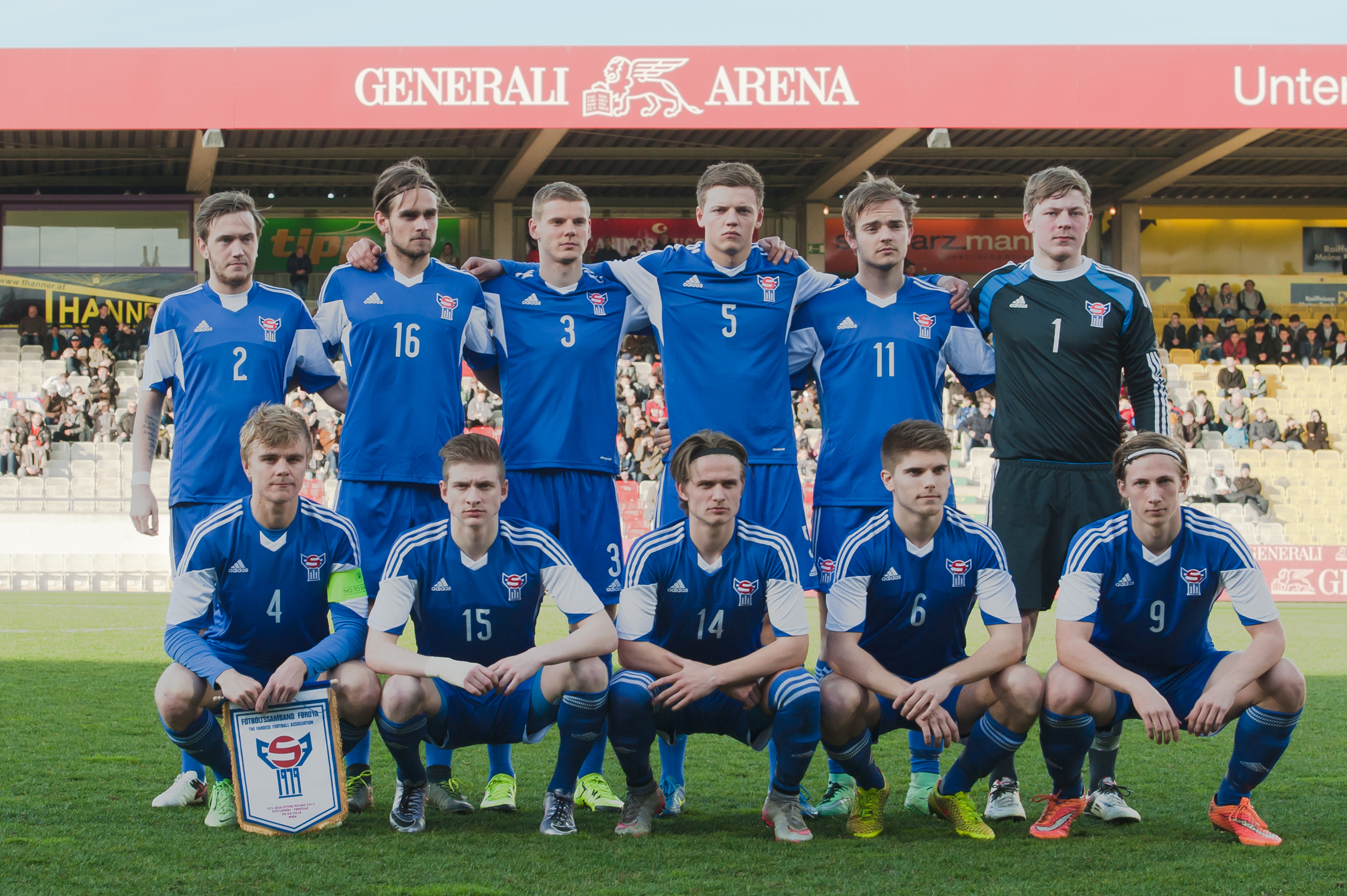 U21 EM-Qualifikation Österreich gegen Färöer am 29. März 2016 in Wien: U21-Nationalteam Färöer - Andrias Eriksen (FRO), Teit Jacobsen (FRO), Betuel Hansen (FRO), Jonas Geiel Hansen (FRO), Jakup Thomsen (FRO) (v.l. hockend), Leivur Joensen (FRO), Magnus Egilsson (FRO), Ari Jonsson (FRO), Hoerdur Askham (FRO), Gestur Dam (FRO), Elias Rasmussen (FRO) (v.l. stehend)